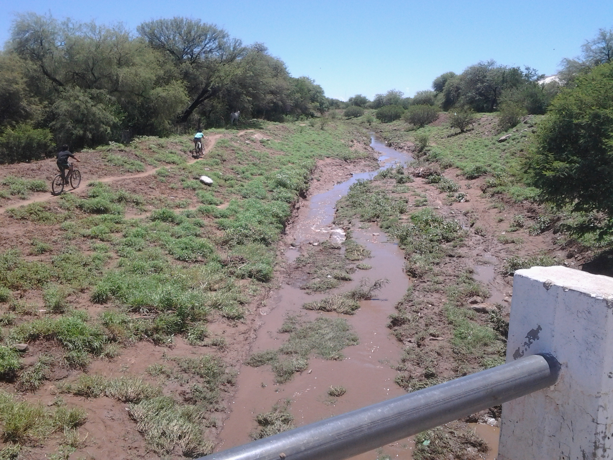 Imagen del uadi Tirante, tomada despues de una lluvia. Dicho uadi se halla localizado en Chamical, un departamento de La Rioja, Argentina.